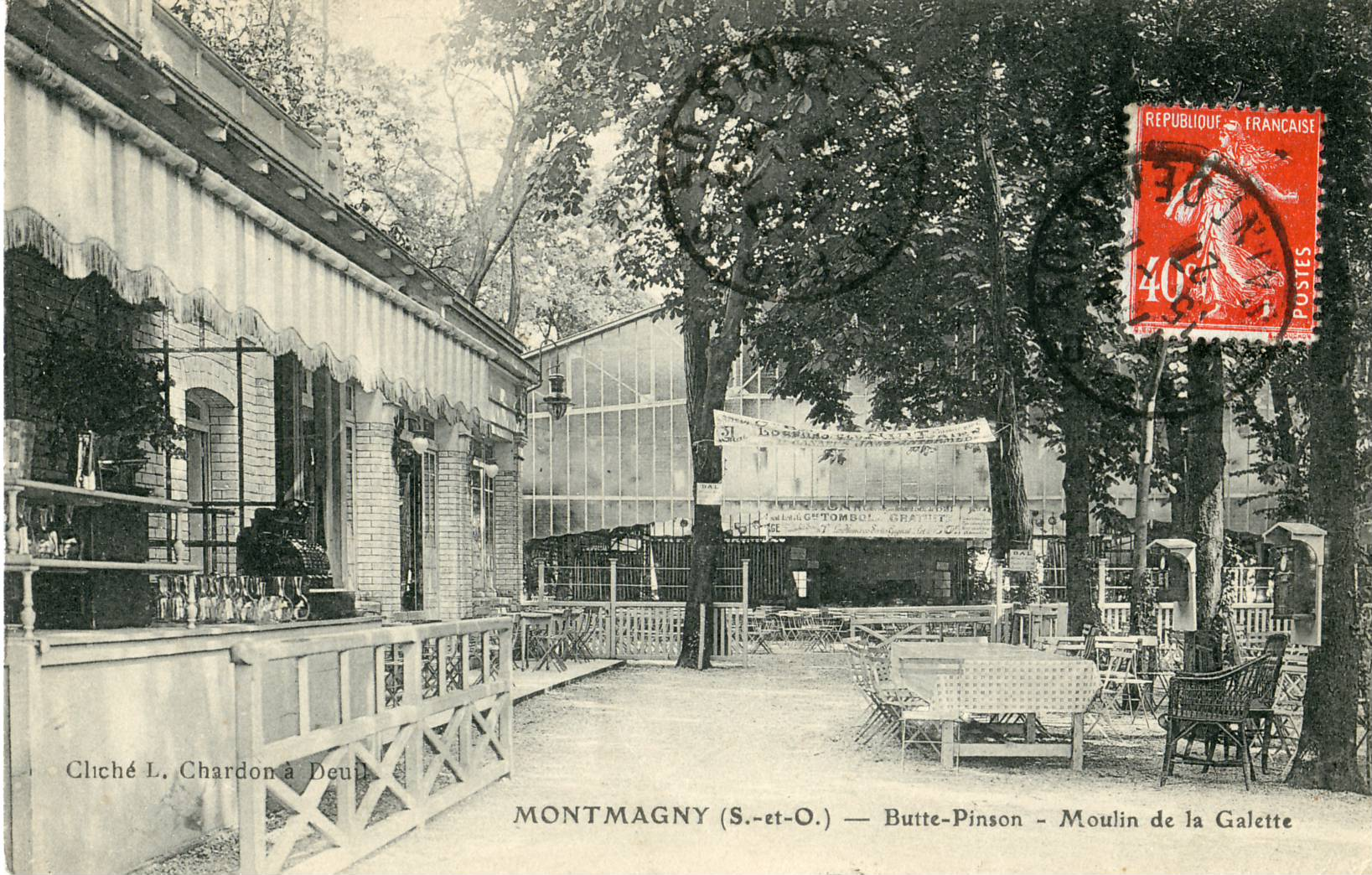 Carte postale ancienne éditée par Chardon, montrant la guinguette le Moulin de la Galette à Montmagny